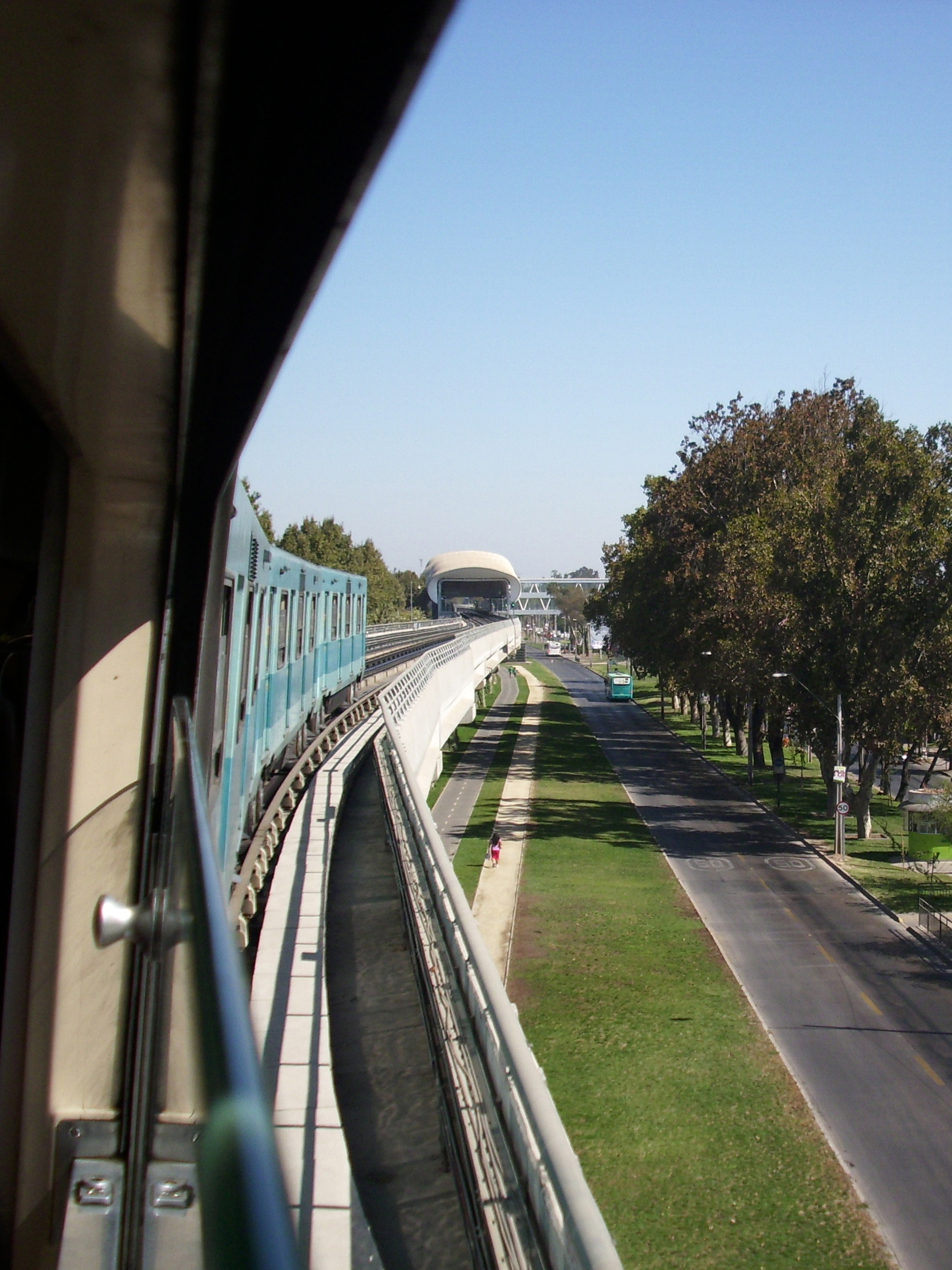 Un tren del Metro de Santiago viajando por el viaducto a punto de llegar a la estación Las Parcelas, en la comuna de Maipú. Fotografía tomada desde el interior del vagón justo en la curva sobre Av. Pajaritos y Teniente Cruz. Maipú, Santiago de Chile, 30 de marzo de 2012.